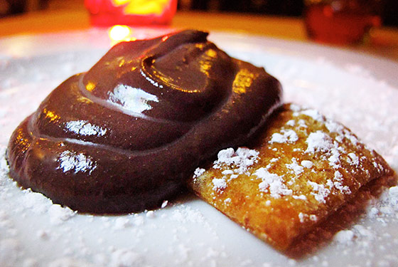 foto de sanguinaccio